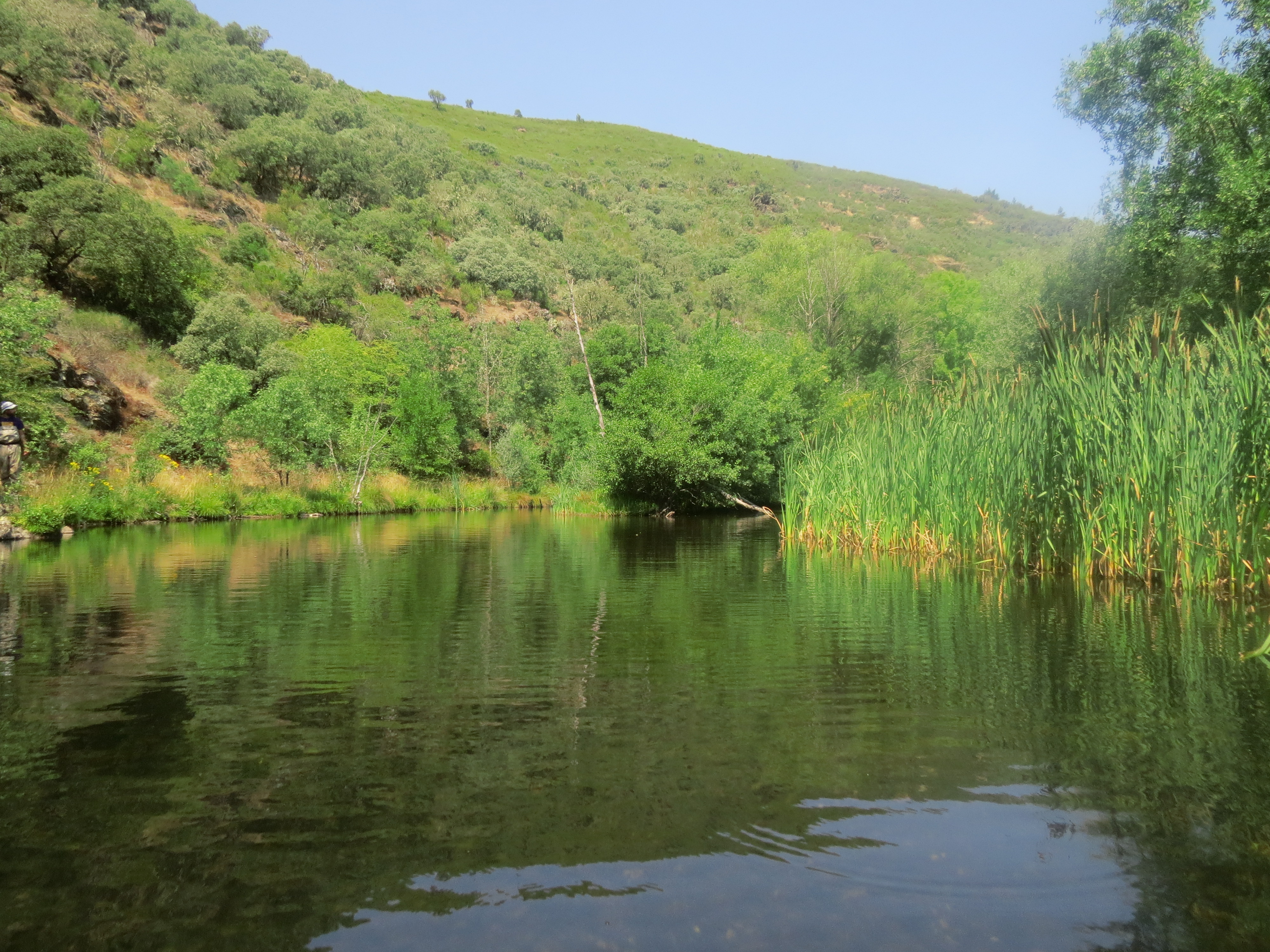 Riberas del río Manzanas y afluentes This is a photography of a Site of Community Importance in Spain with the ID: ES4190132. Natura2000 entry, EEA entry